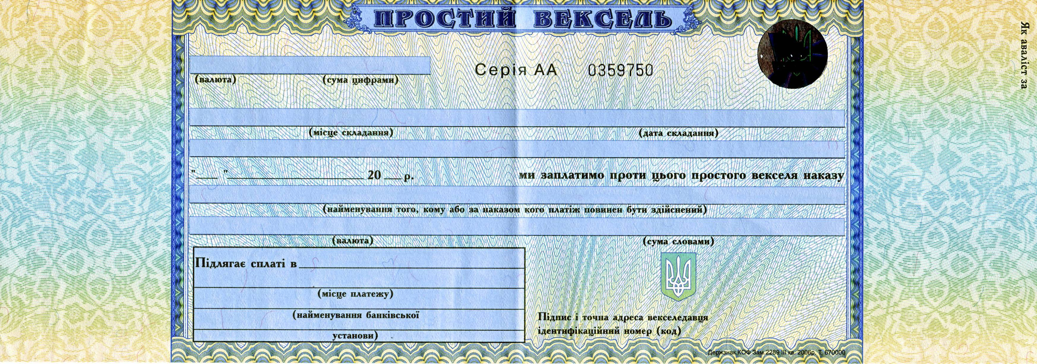 вексель